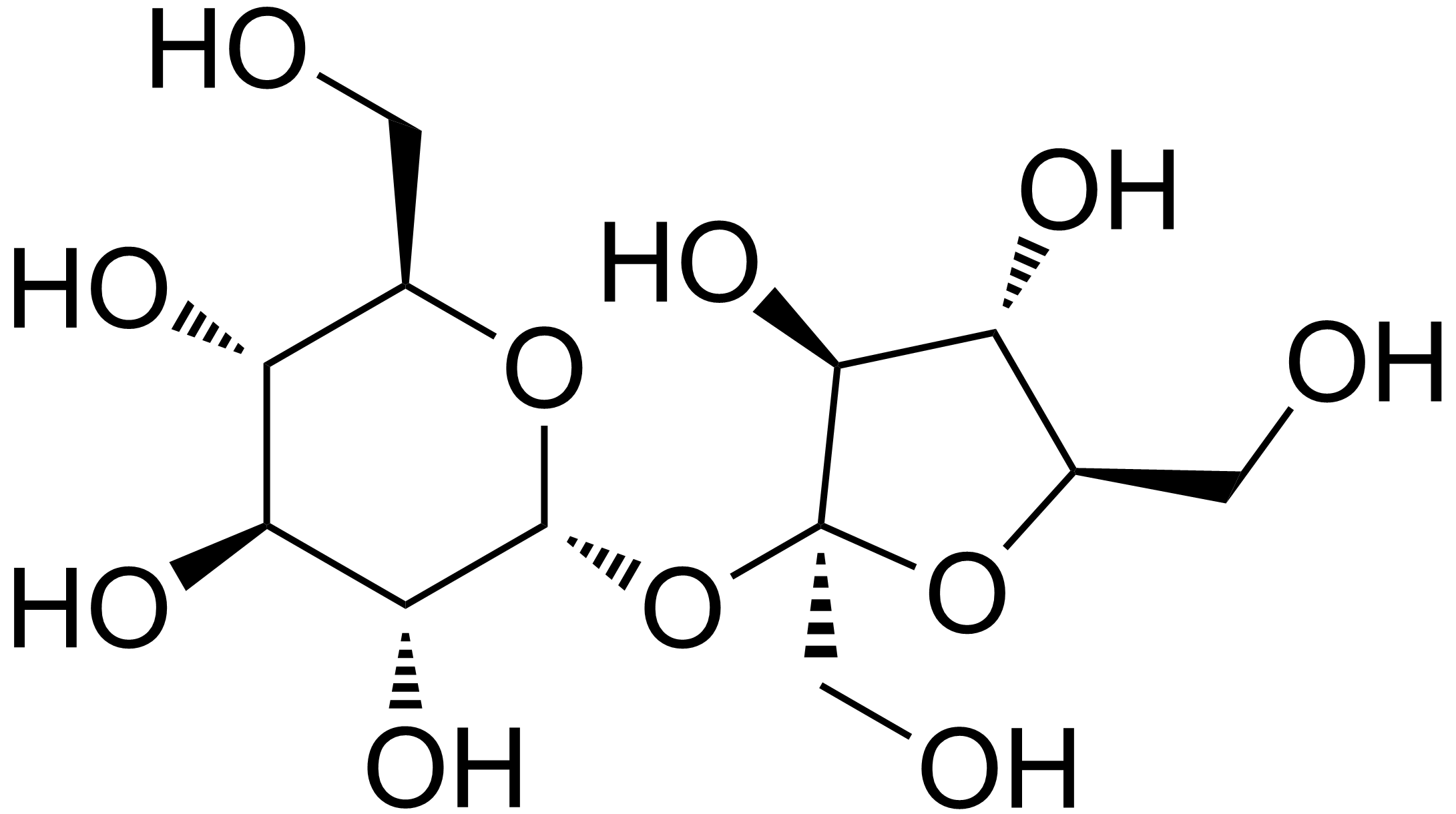 Sucrose chemical structure